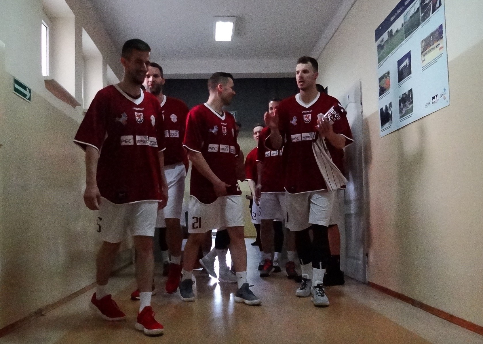 Spójnia Stargard (28.04.2018)